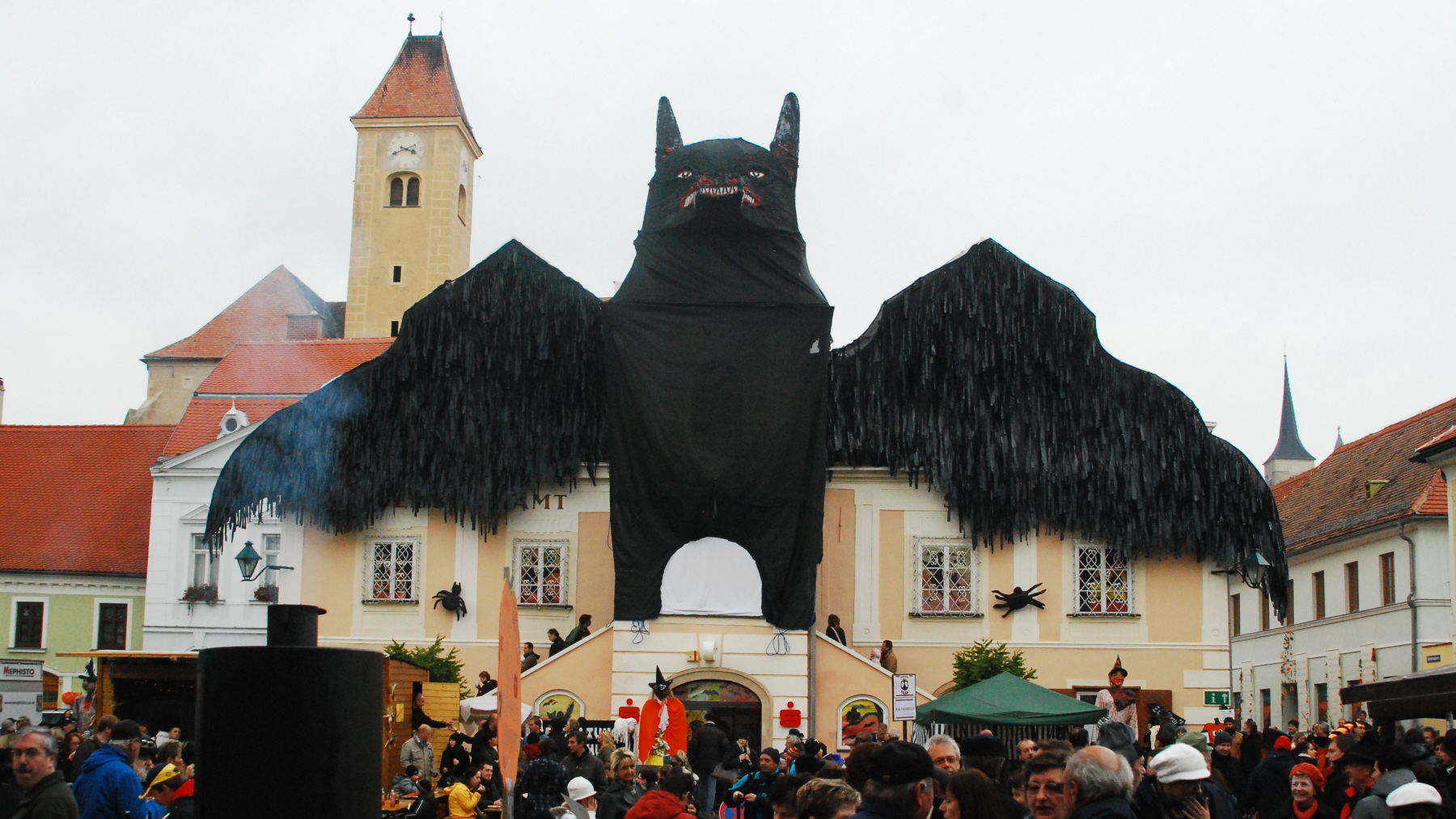 Das Rathaus von Pulkau in Niederösterreich - verkleidet als Fledermaus während des Kürbisfestes im Retzerland.